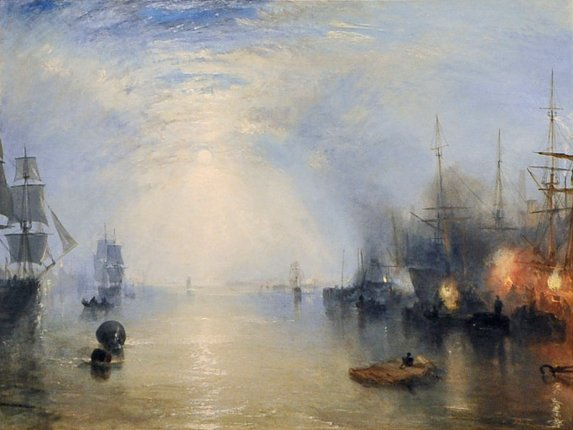 detail